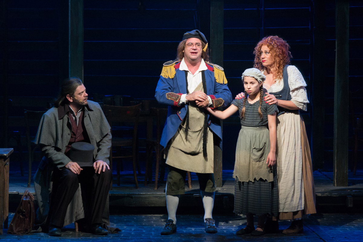 שי הראל על הבמה בתפקיד קוזט הקטנה במחזמר "עלובי החיים" בתיאטרון הבימה, יחד עם אמיר דדון, מיקי קם ואורי הוכמן